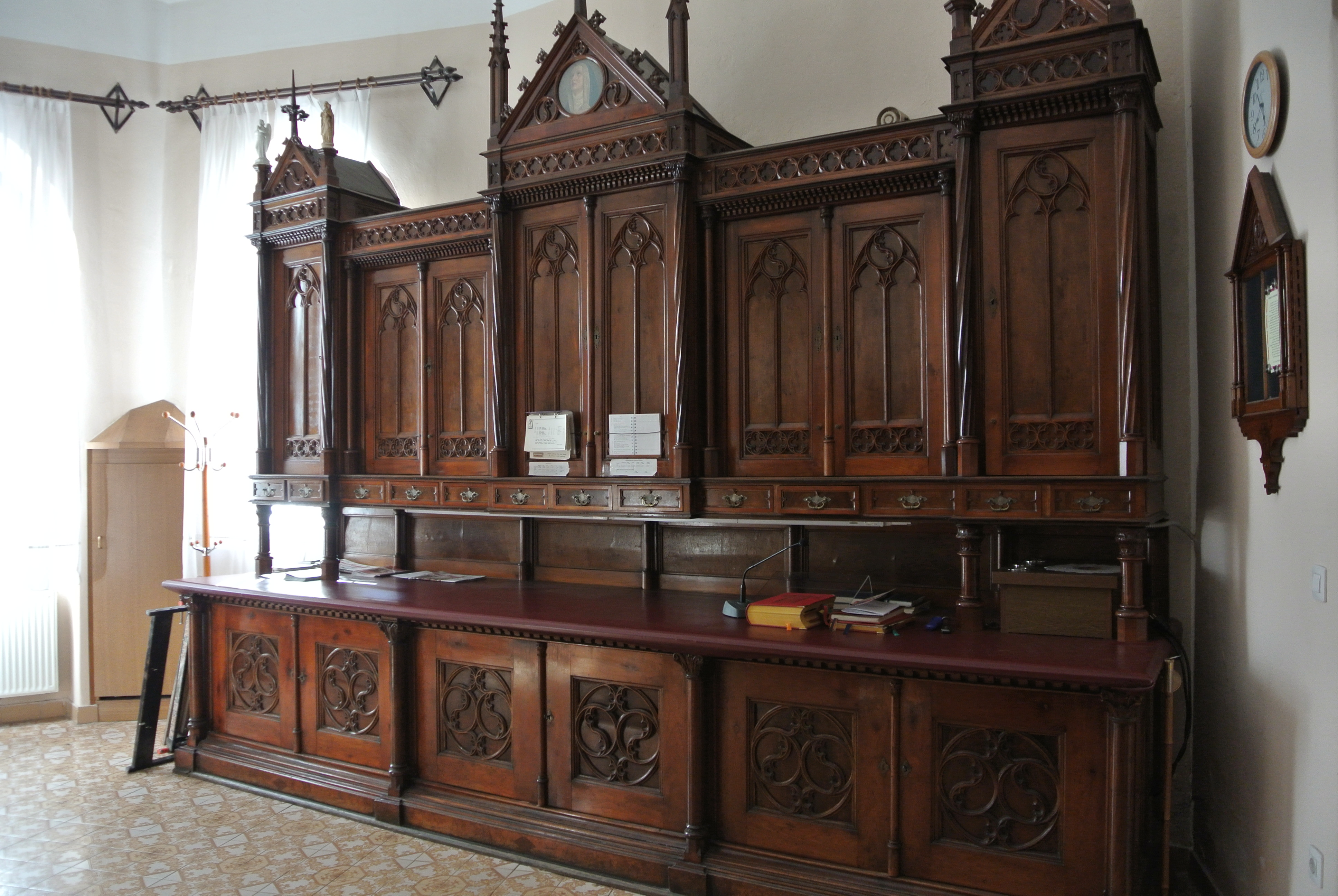 Zakristija cerkve Srca Jezusovega v Ljubljani.